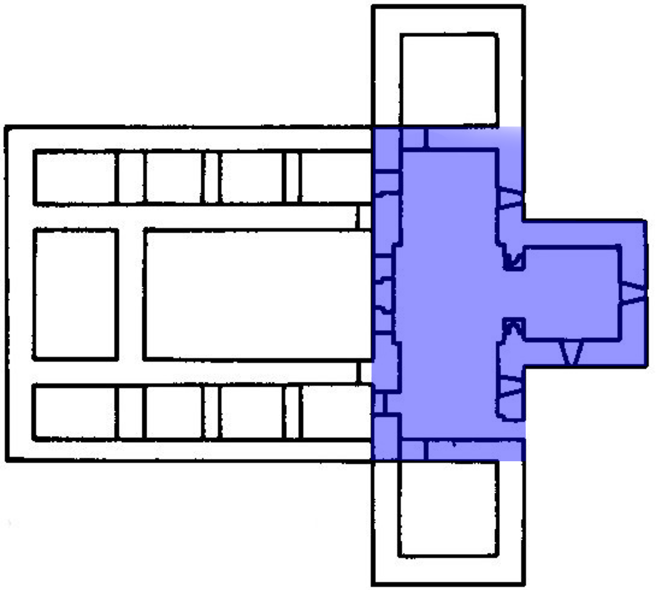 date du cliché : octobre 2001